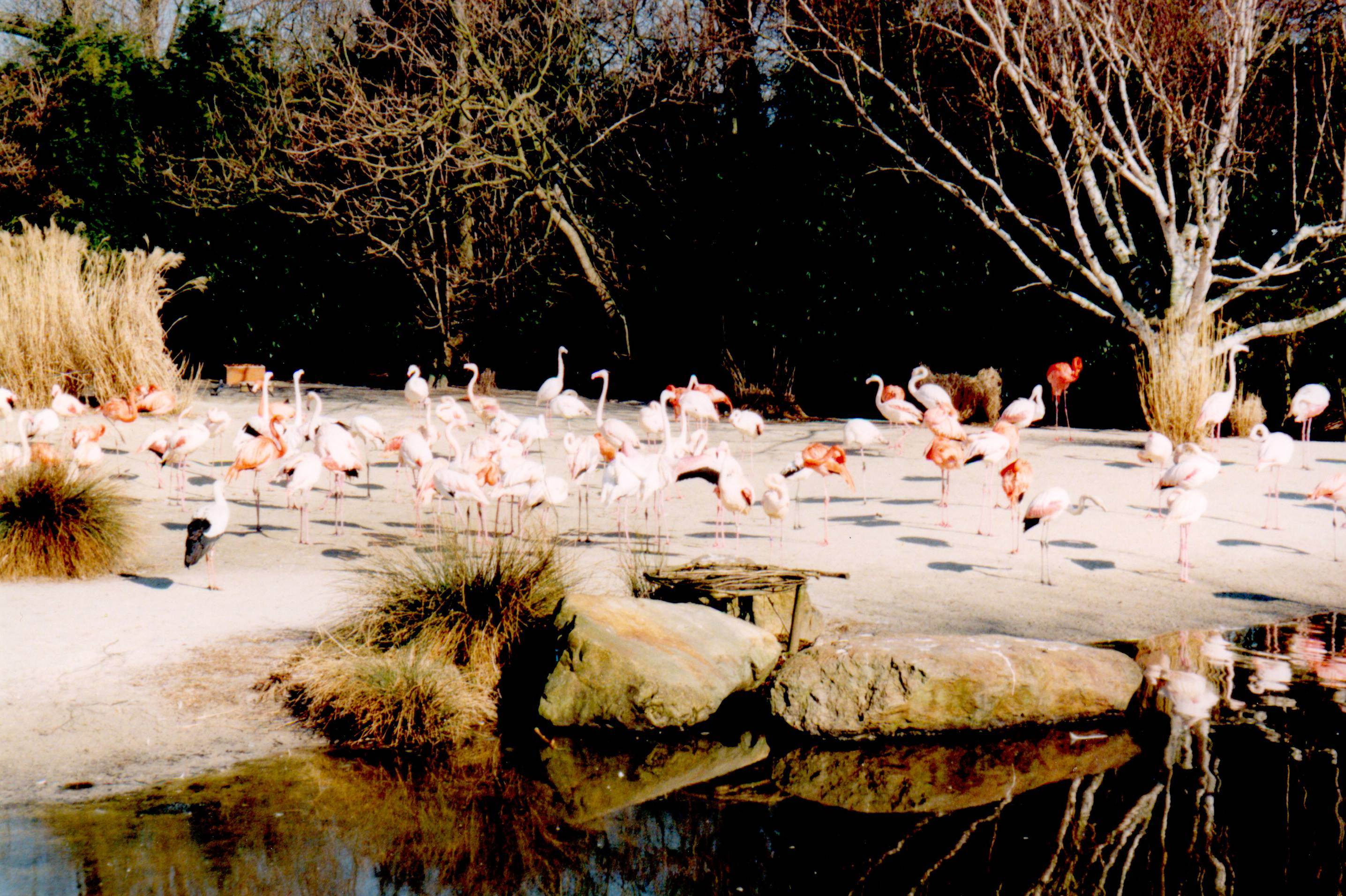 Flamingo's (Phoenicopterus roseus) in zoo "Diergaarde Blijdorp"